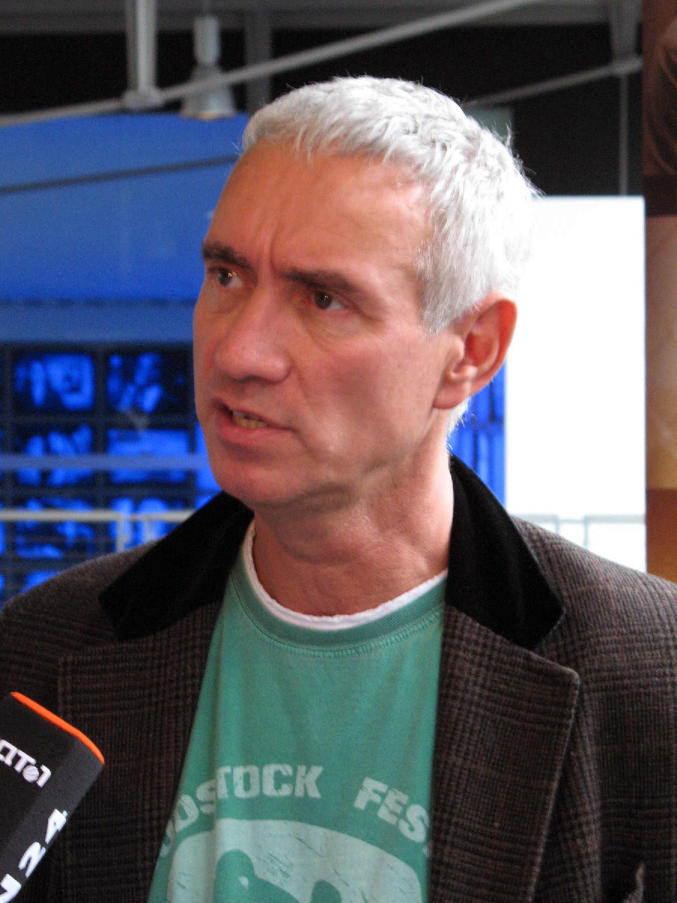 Roland Emmerich nach der Pressekonferenz zur deutschen Filmpremiere Trade, Berlin, 11.10.2007